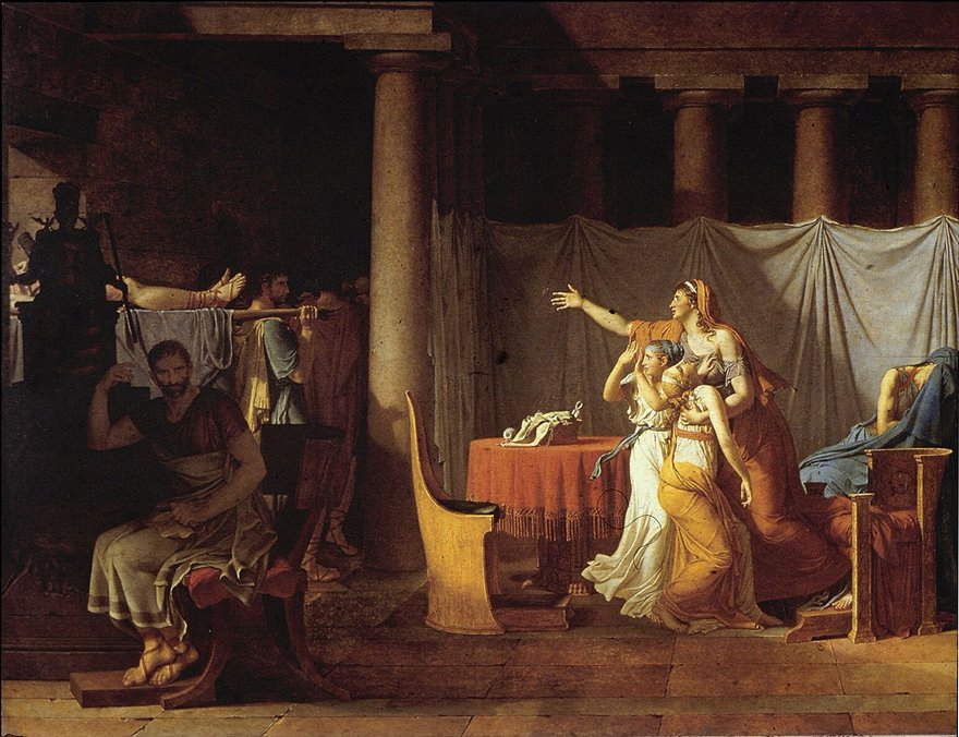 Les licteurs rapportant à Brutus les corps de ses fils, 1789